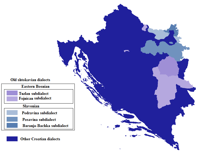 Dijalekti i poddijalekti starošćakavskih u RH i BiH